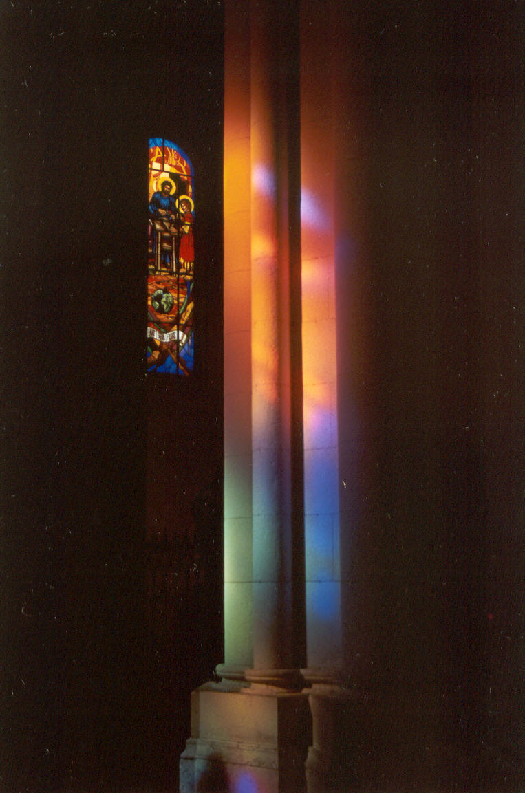 Refracción de la luz a través de los vitrales en la Catedral de La Almudena (Madrid). Autor: Met (con autorización). Fecha: octubre 2002